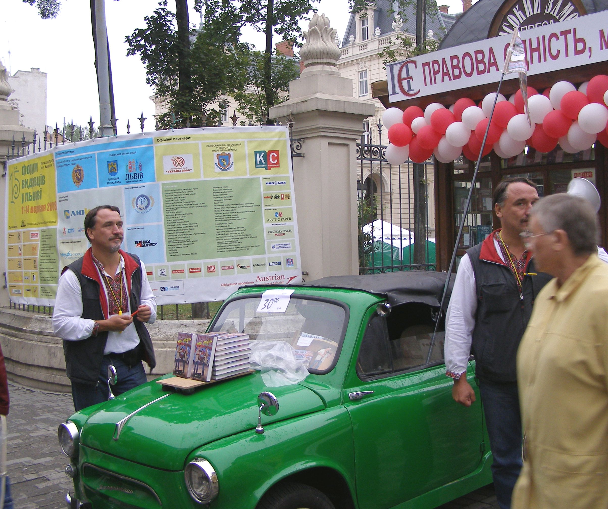 Die Brüder Kapranow präsentieren ihre Bücher neben ihrem Saporoschez